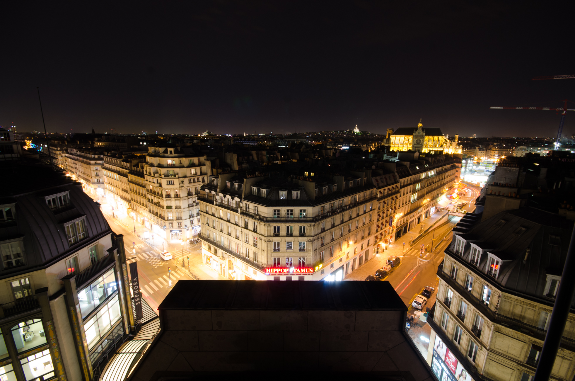 Vu prise sur un toit parisien